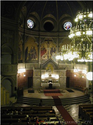 Lodz - Kosciol sw. Mateusza ul. Piotrkowska